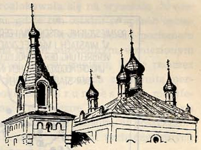 Беларуская (тарашкевіца): Браслаў (Brasłaŭ), вуліца Вялікая (vulica Vialikaja). Прачысьценская царква-мураўёўка